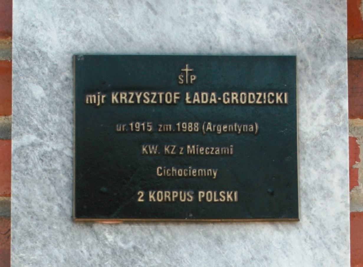 Kwatera Pierwszej Samodzielnej Brygady Spadochronowej na Powązkach Wojskowych w Warszawie